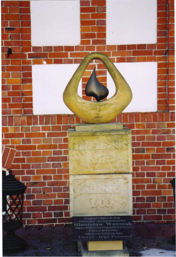 Pomnik i tablica upamiętniająca tragiczną śmierć Stanisława Woźniaka